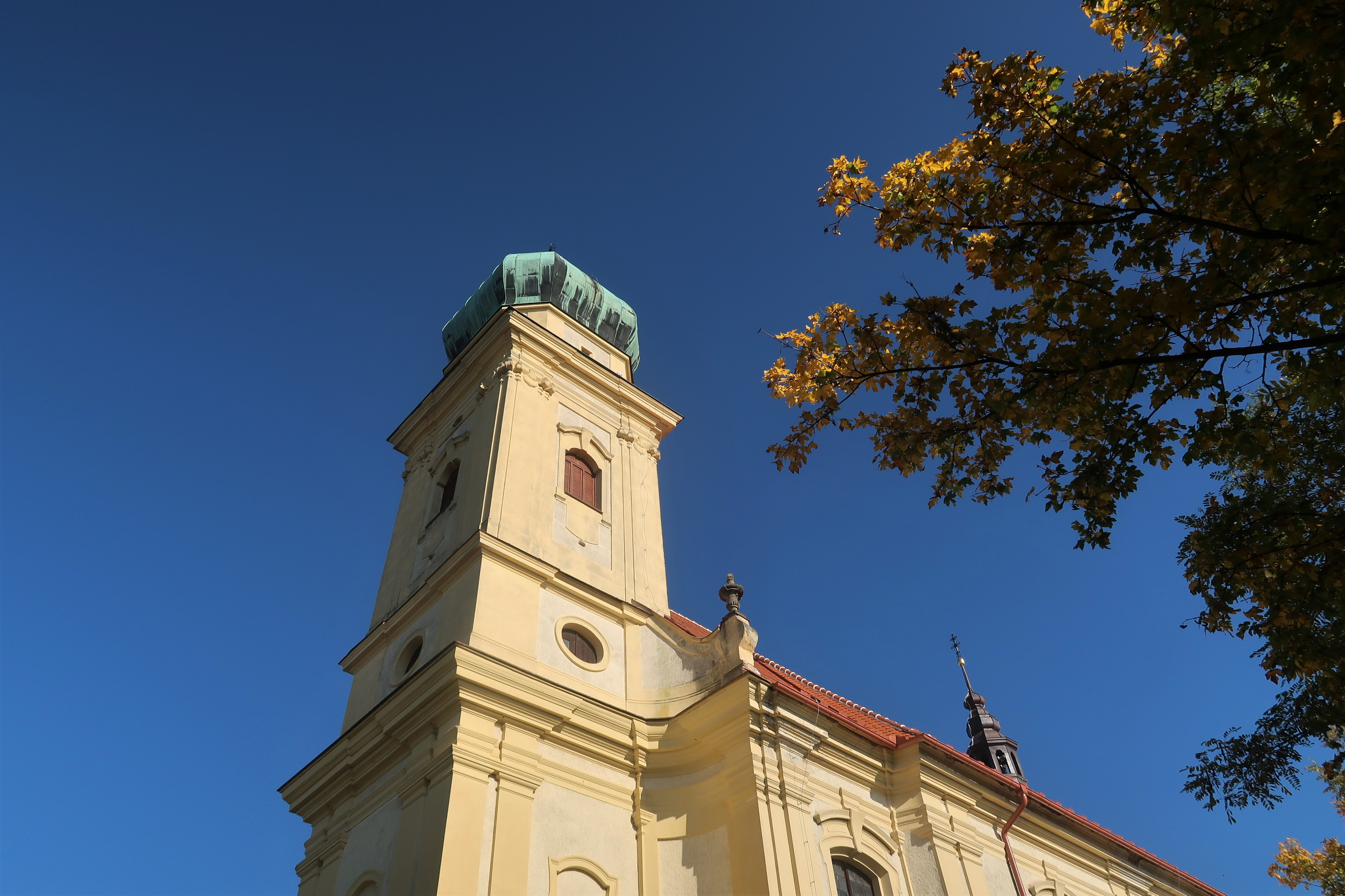 Luleč (okres Vyškov), poutní kostel sv. Martina (1751-1753)